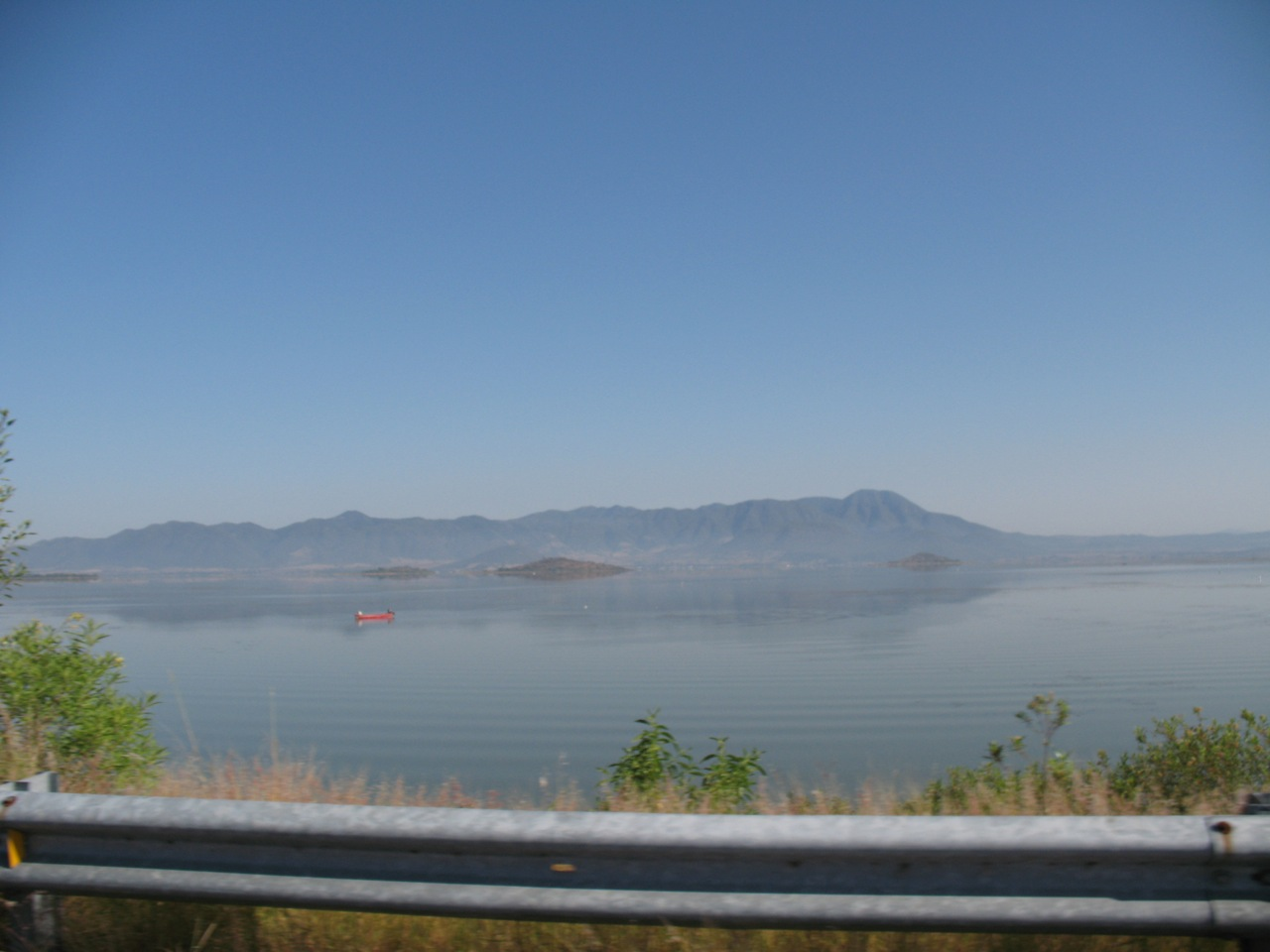 Lago Cuitzeo — Este es el lago mas grande que he visto en mi vida!! Obviamente no conozco mucho lago verdad pero este me impresionó. En los Eje Volcánico Transversal.